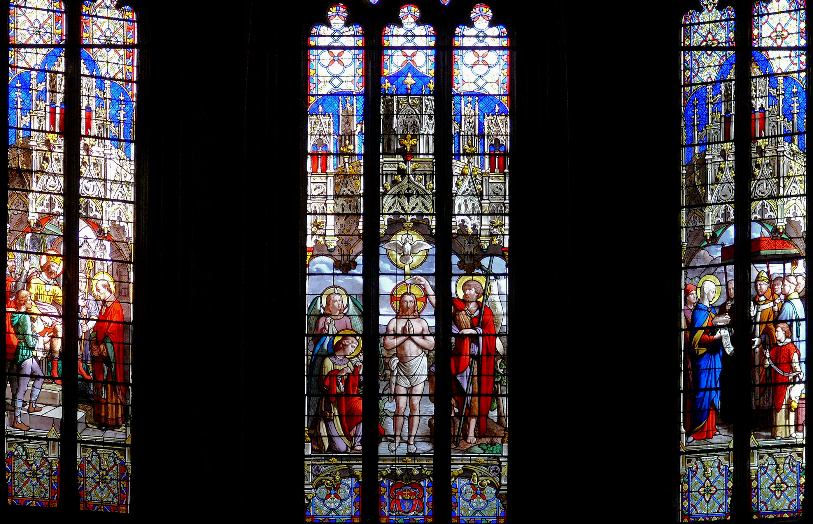 Cathédrale Saint-Jean-Baptiste de Saint-Jean-de-Maurienne - Cathédrale - Vitraux de l'abside